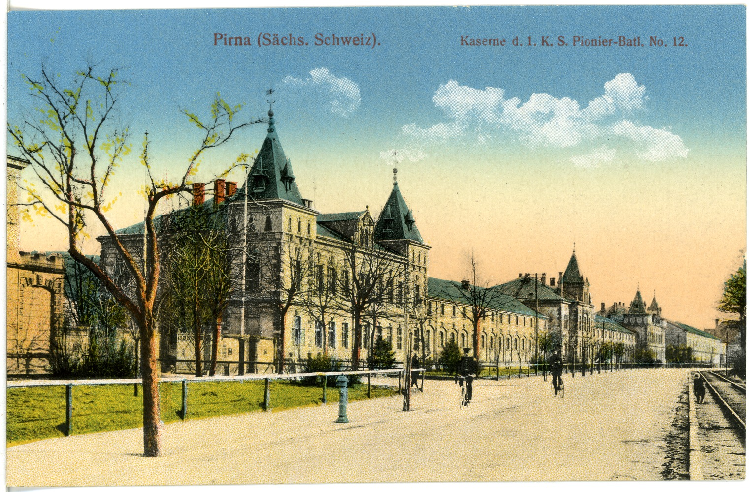 Pirna; Kaserne des 1. Königlich Sächsischen Pionier-Bataillon Nr. 12 This postcard is from publisher Brück & Sohn in Meißen ( postcard has a unique number 17719 and is available in a higher resolution at the publisher. This images was uploaded in a cooperation project between Wikipedians and the publisher.